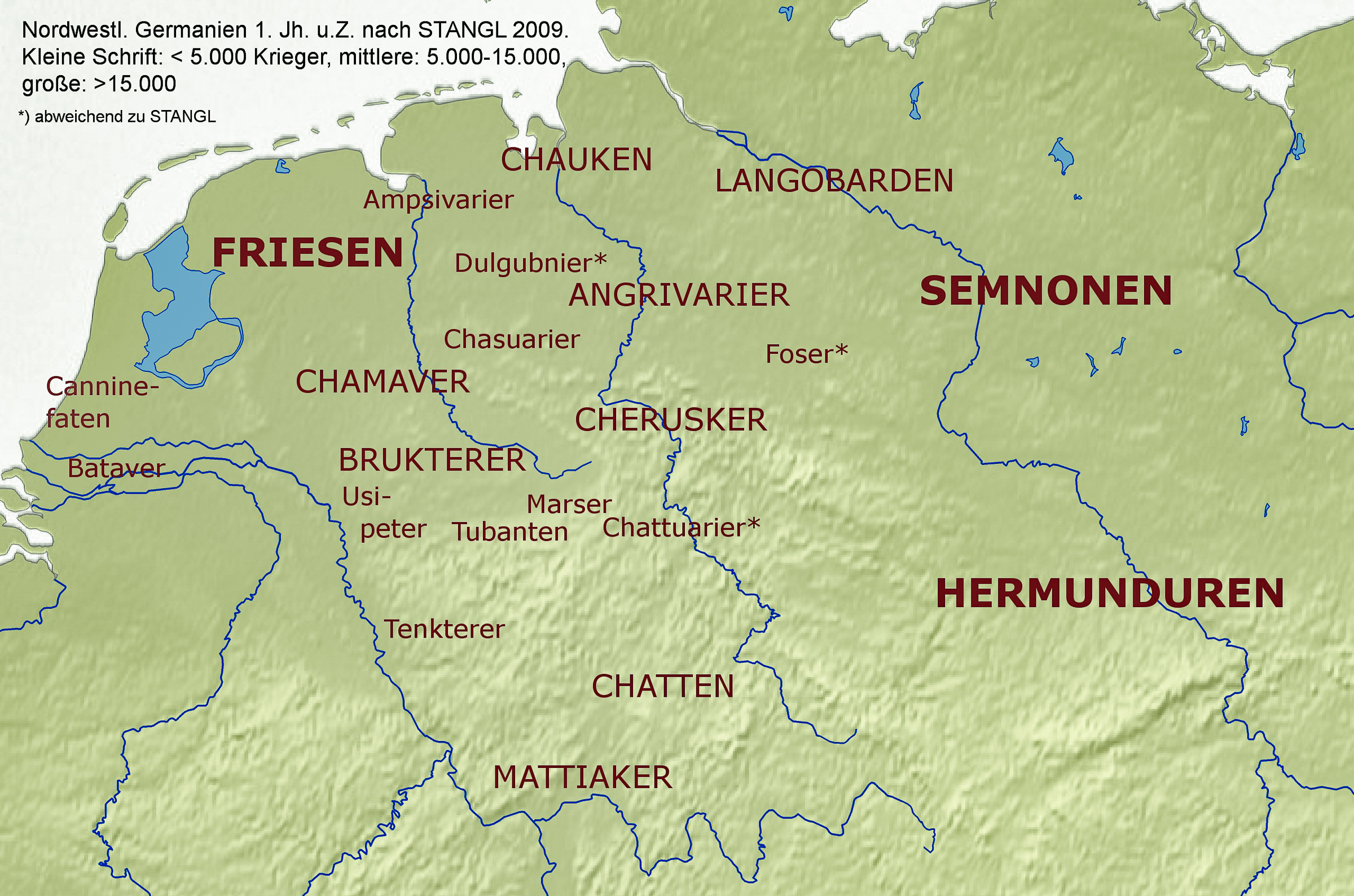 Nordwestgermanien im 1. Jh. u.Z.